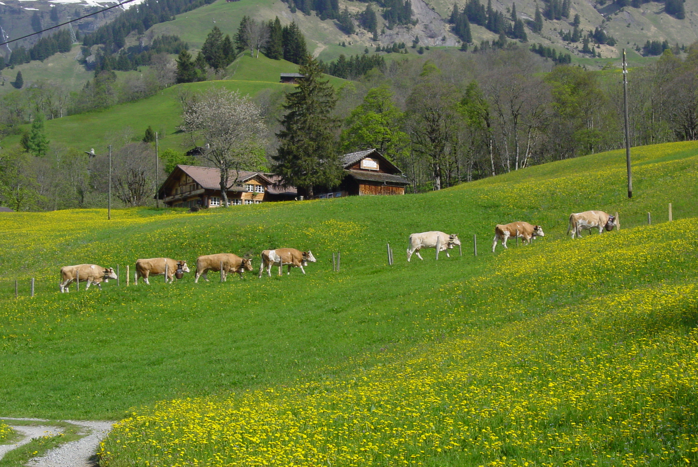 Alpaufzug Simmentaler Kühe (Fleckvieh) im Berner Oberland